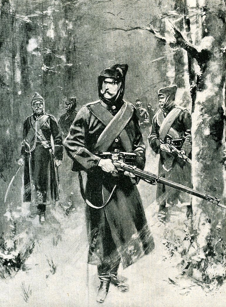 les chasseurs-éclaireurs russes en recconnaissance un corps d'éliote qui ne se met jamais la bayonnette au fourreau